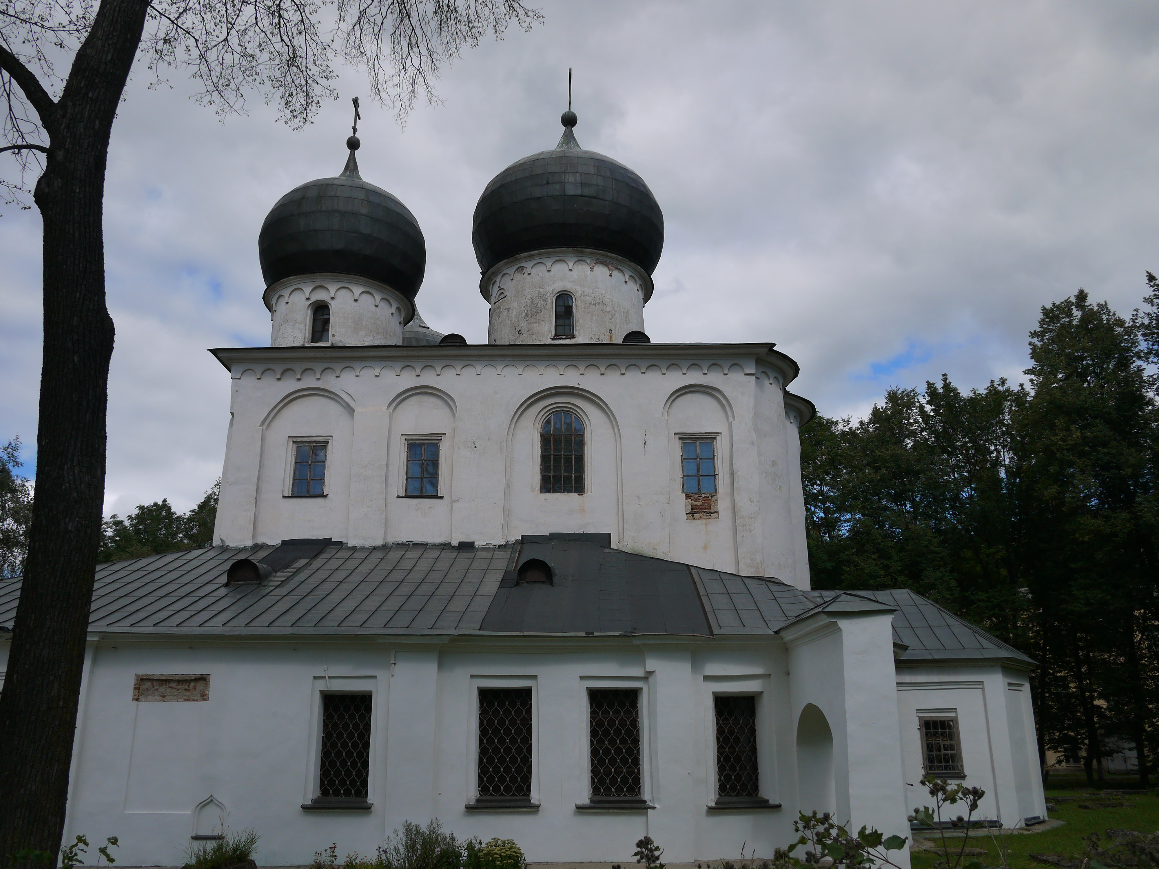 Собор Рождества Пресвятой Богородицы (Новгородская область, Великий Новгород, Антоново)